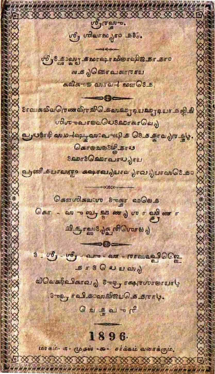 ഗ്രന്ഥലിപിയിൽ എഴുതിയിട്ടുള്ള ഒരു സംസ്കൃതഗ്രന്ഥത്തിന്റെ പുറംതാൾ